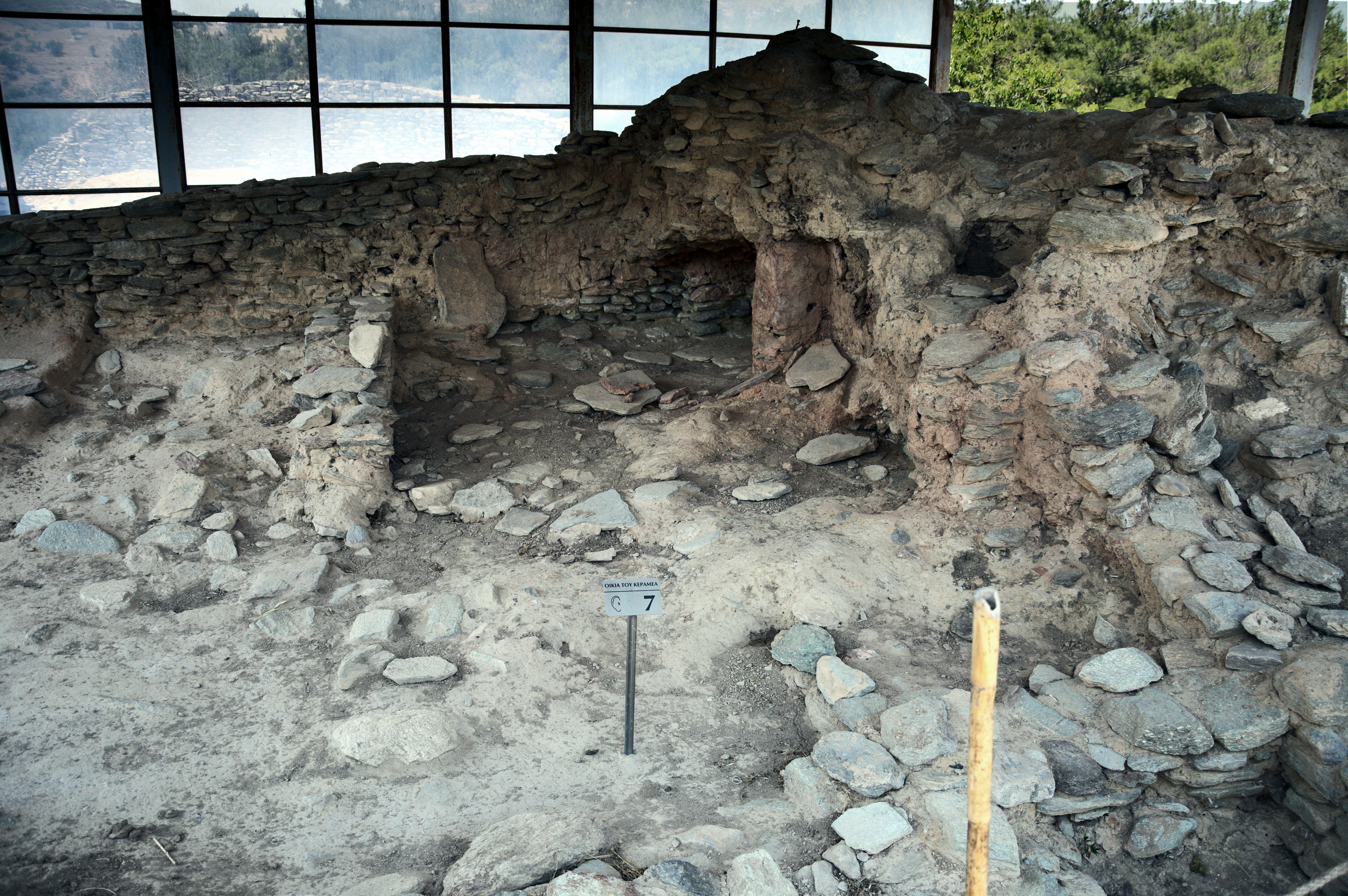 Οικία του Κεραμέα στο Σέσκλο«Οικία του Κεραμέα στο Σέσκλο»